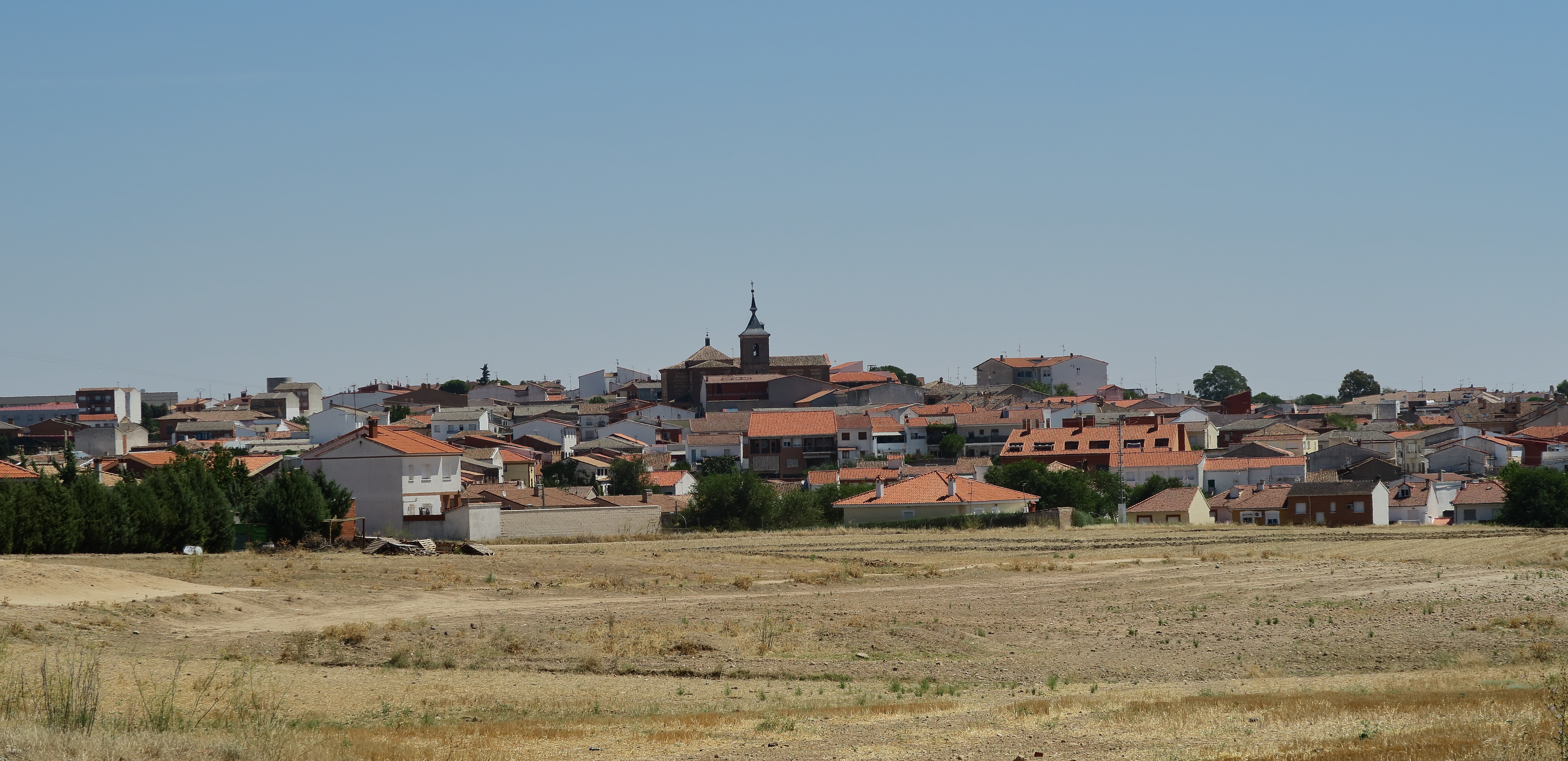 Santa Cruz del Retamar, vista de la población desde N-Va